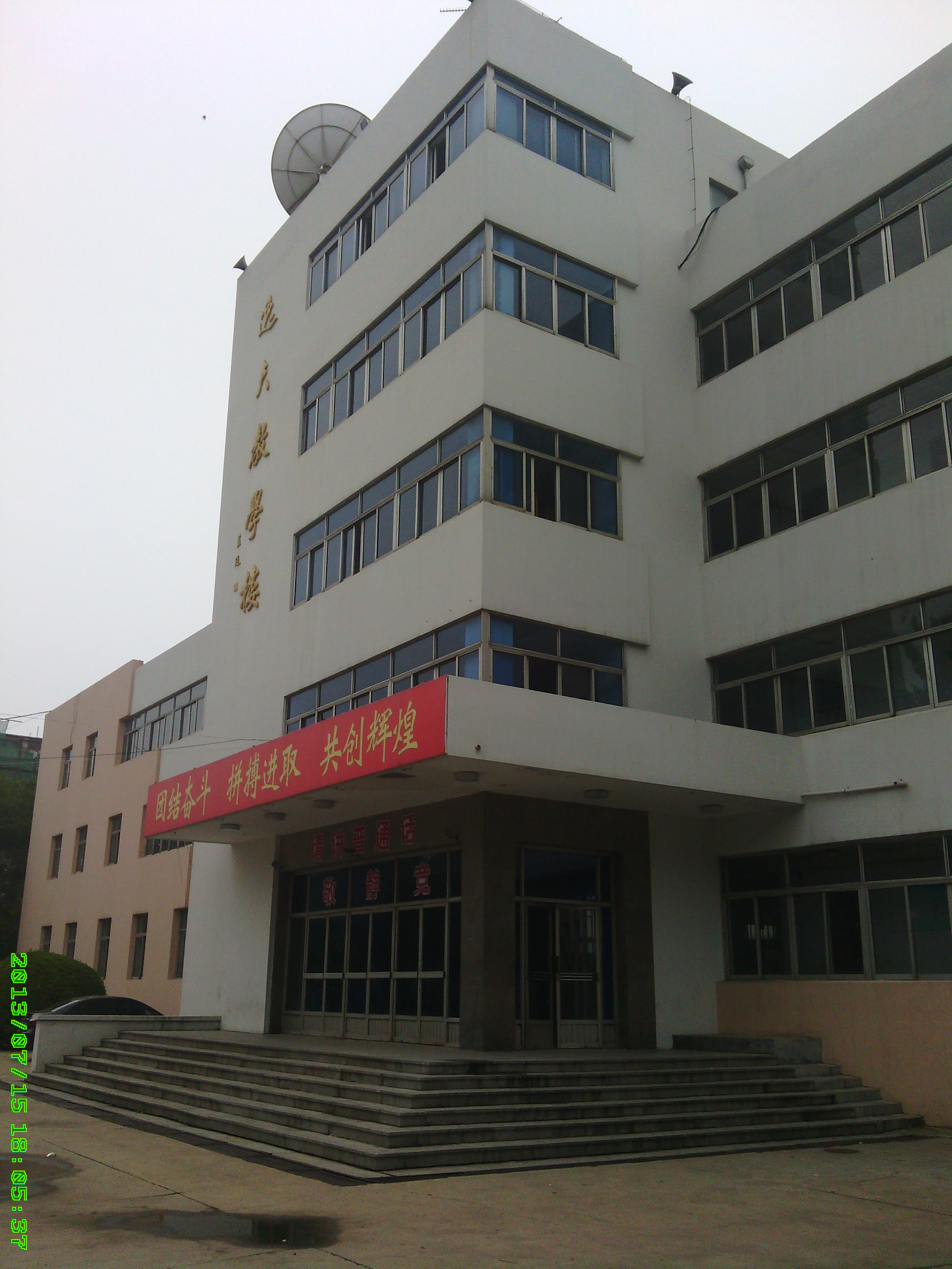 邵逸夫捐建逸夫楼